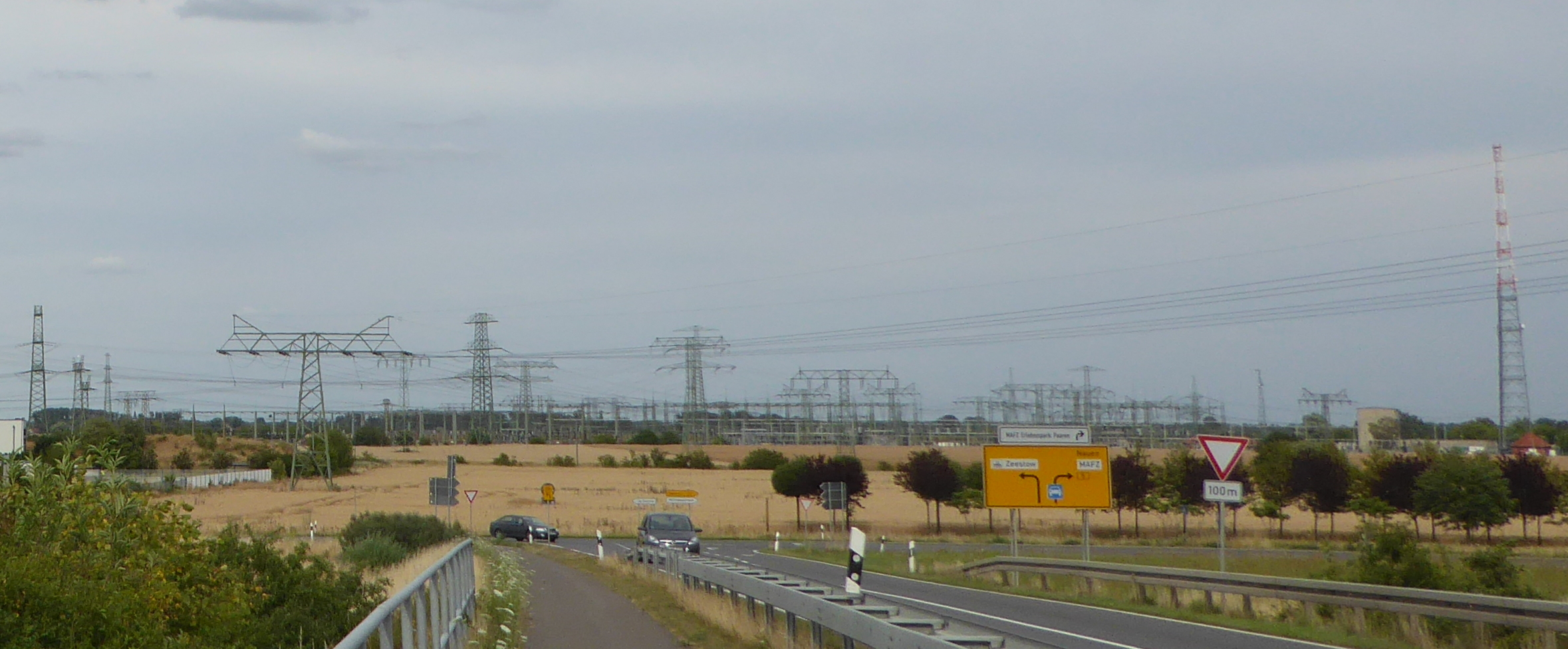 Umspannwerk Wustermark mit Richtfunkturm (rechts), Brandenburg